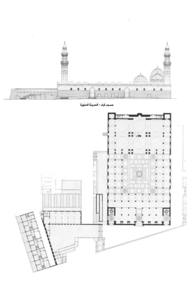 مقطع جانبي